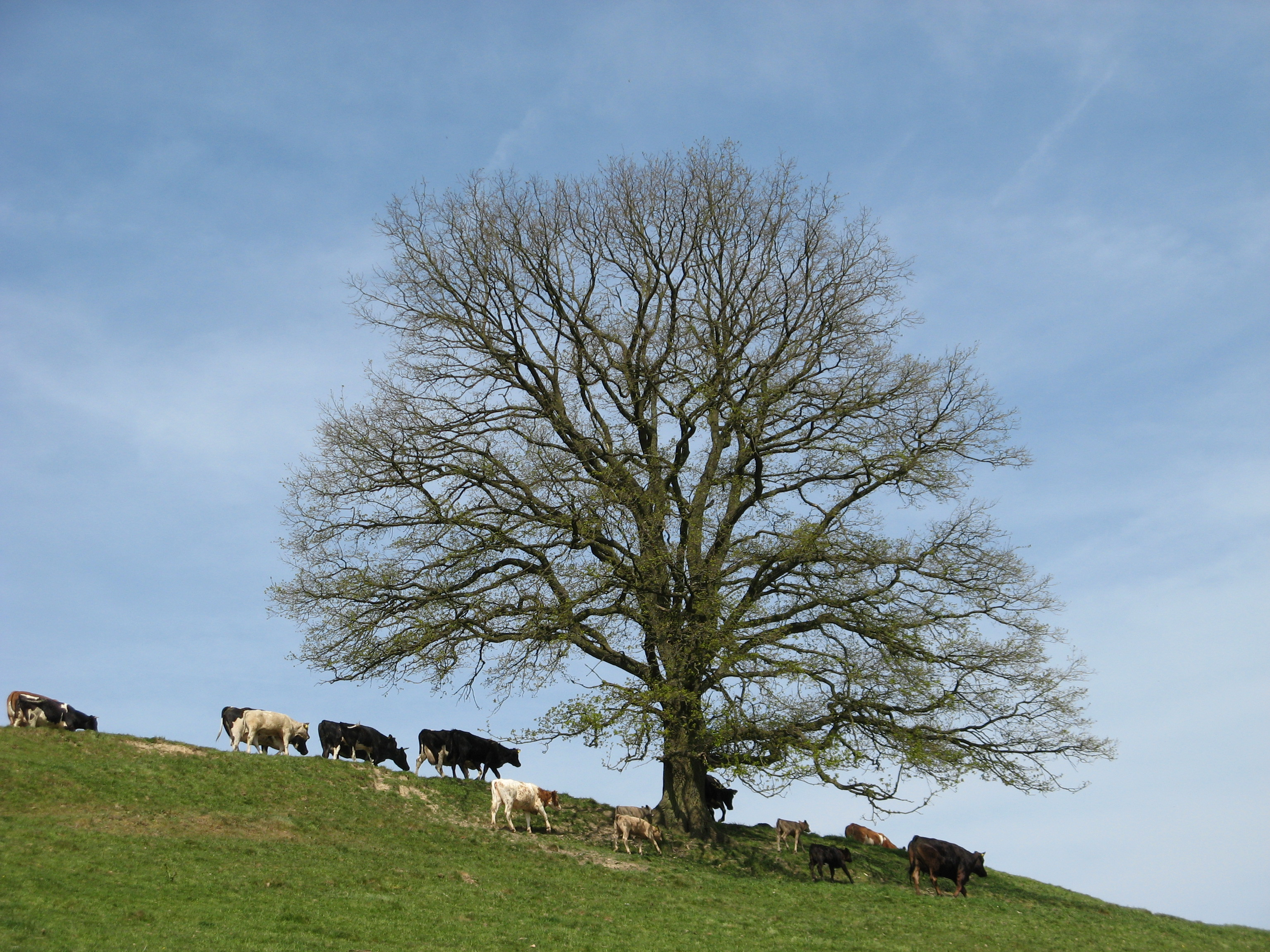 Naturdenkmal „Stieleiche bei Vosswinkel“, Overath, NRW, Deutschland